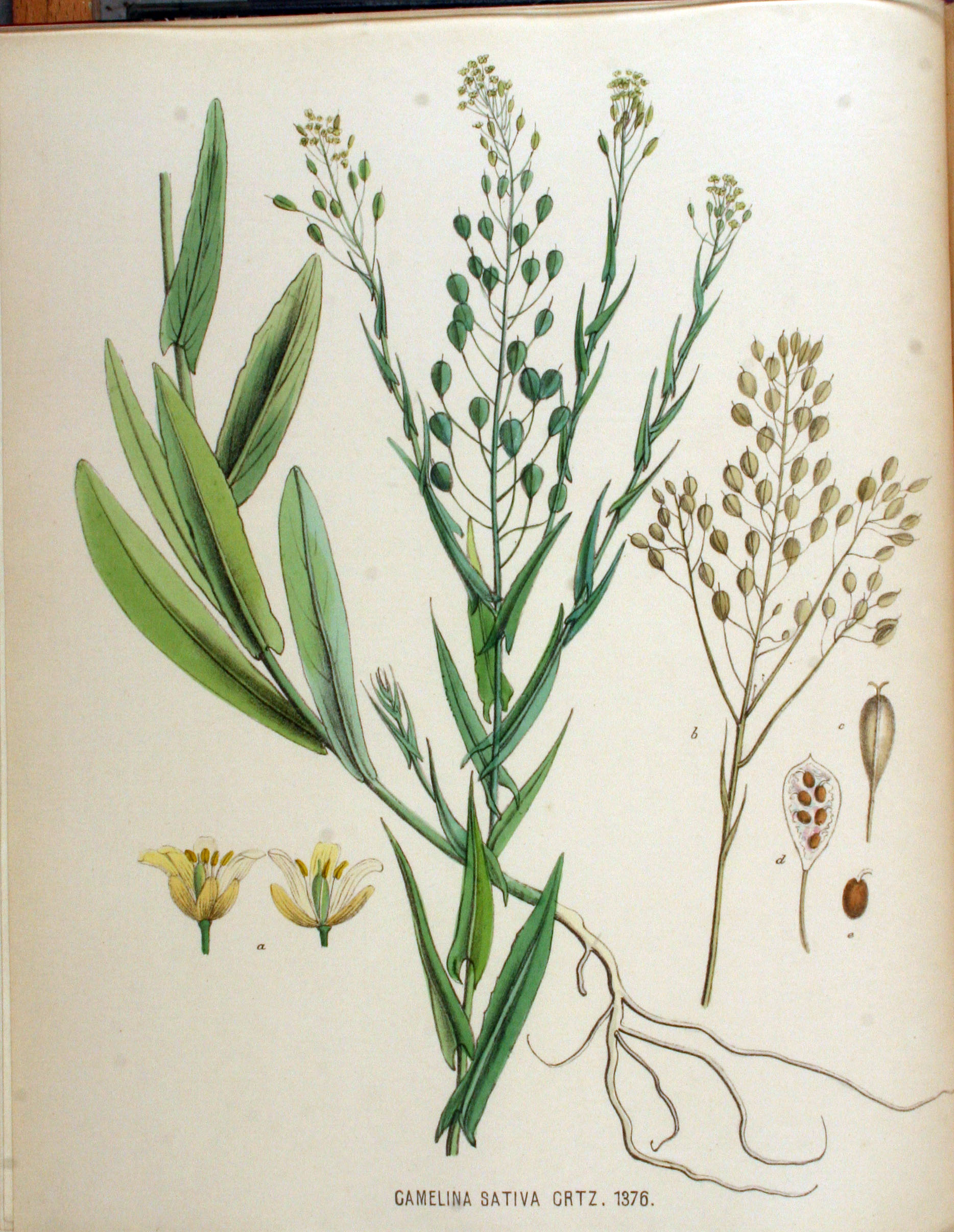 Camelina sativa (L.) Crantz